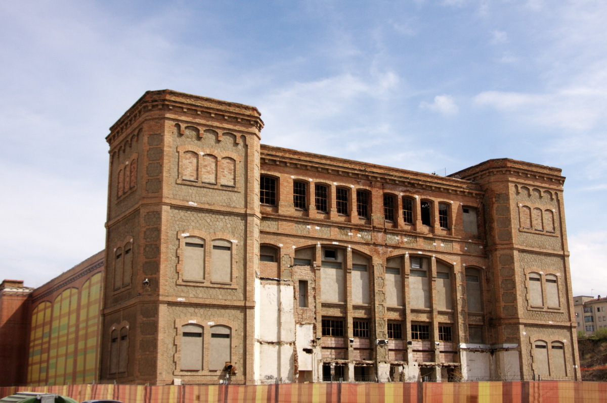 la "fàbrica nova" a Manresa, obra modernista tardana de Salvador Vinyals i Sabaté, encarregada per Eusebi Bertrand i Serra el 1926